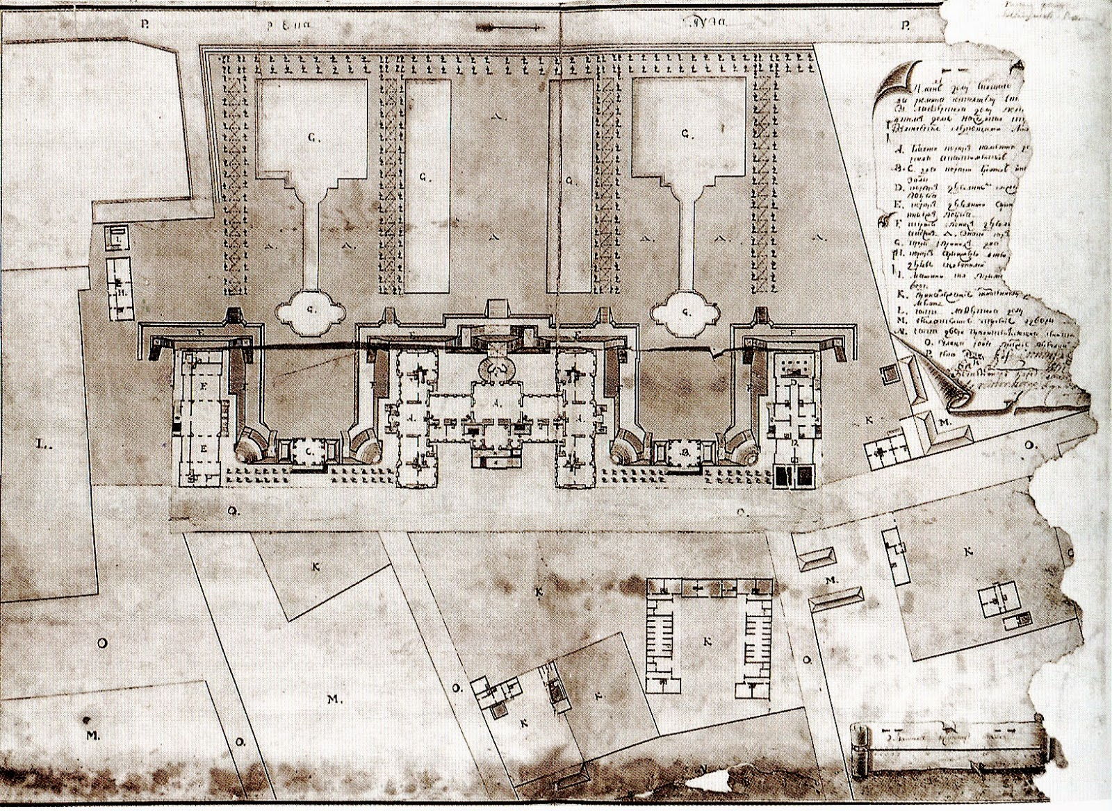 Генеральный план дома и флигелей усадьбы А. П. Бестужева-Рюмина, составленный после конфискации имущества